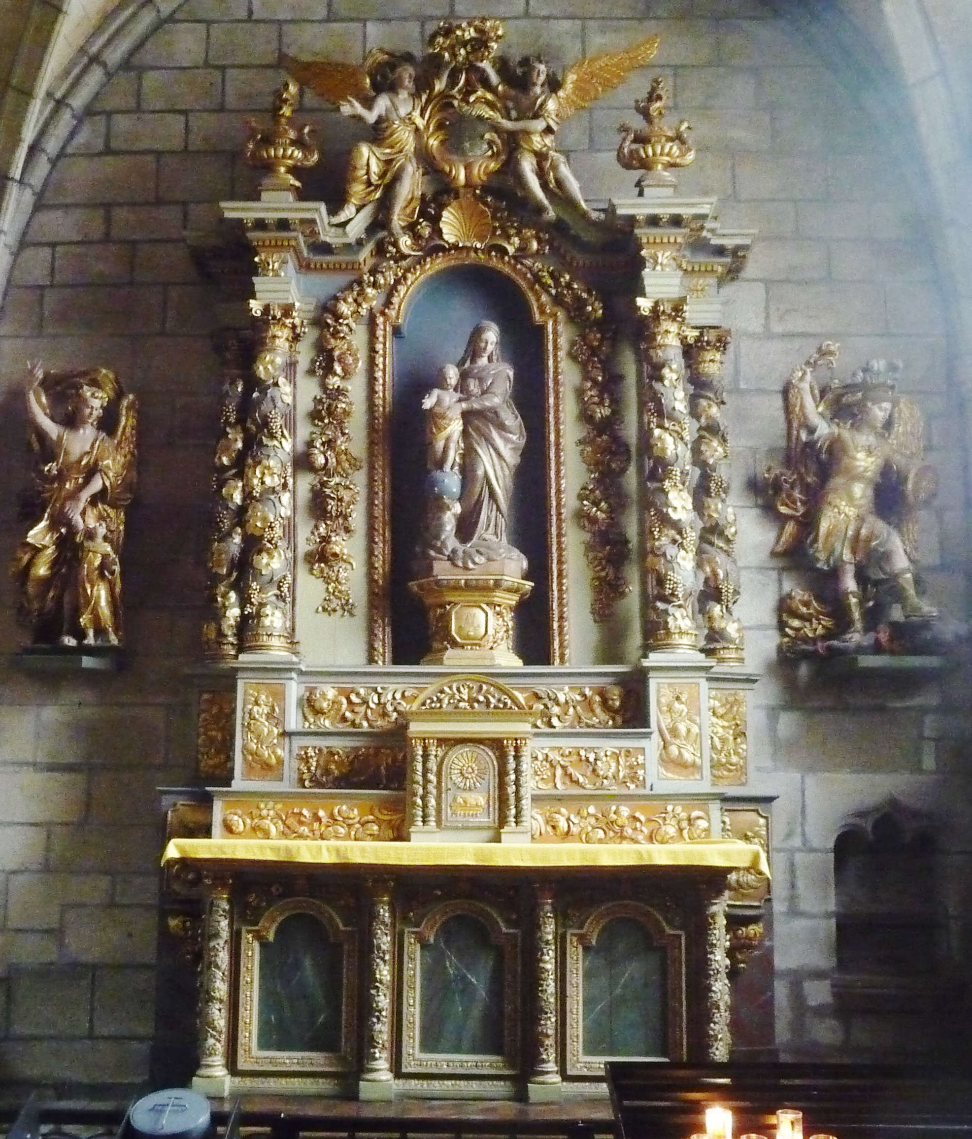 Saint-Pol-de-Léon : cathédrale Saint-Paul-Aurélien, le retable de Notre-Dame du mont Carmel (XVIIème siècle)